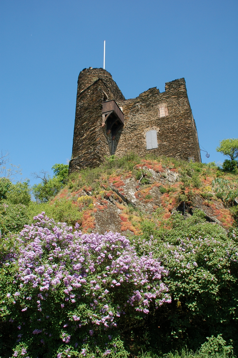 Ruine Nollig, Lorch, Mittelrheintal, Hessen, Deutschland